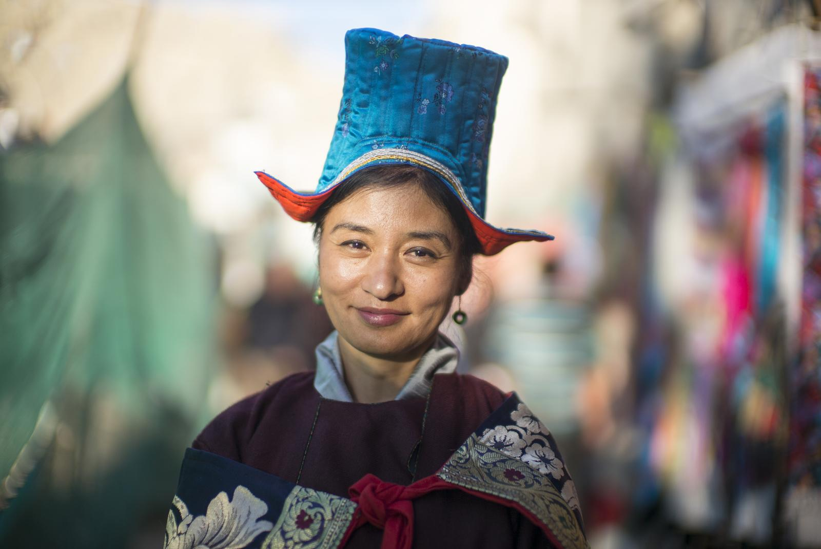 Woman wearing traditional Ladakhi hat at Kalachakra ceremony 2014